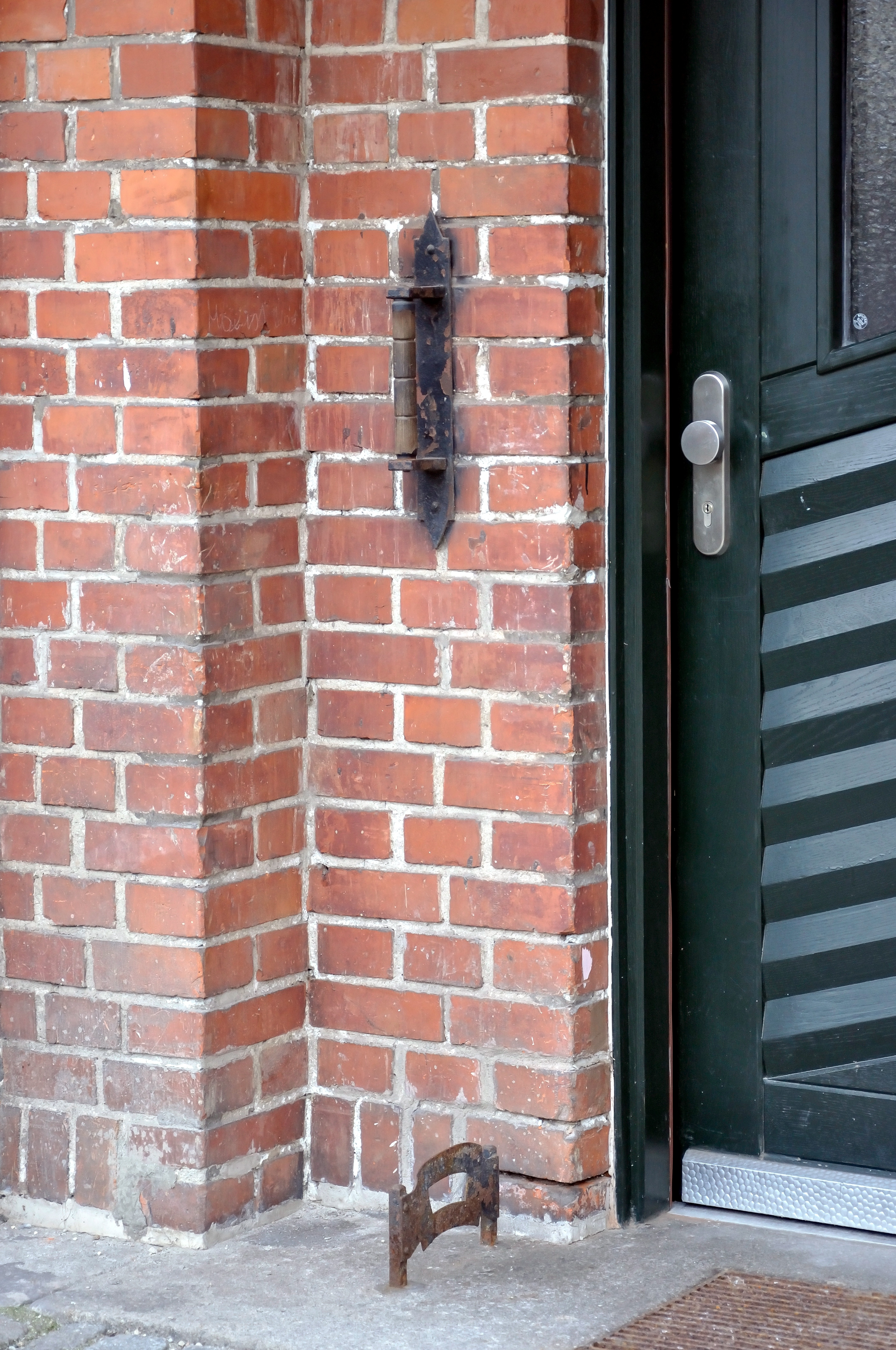 Dametzhof